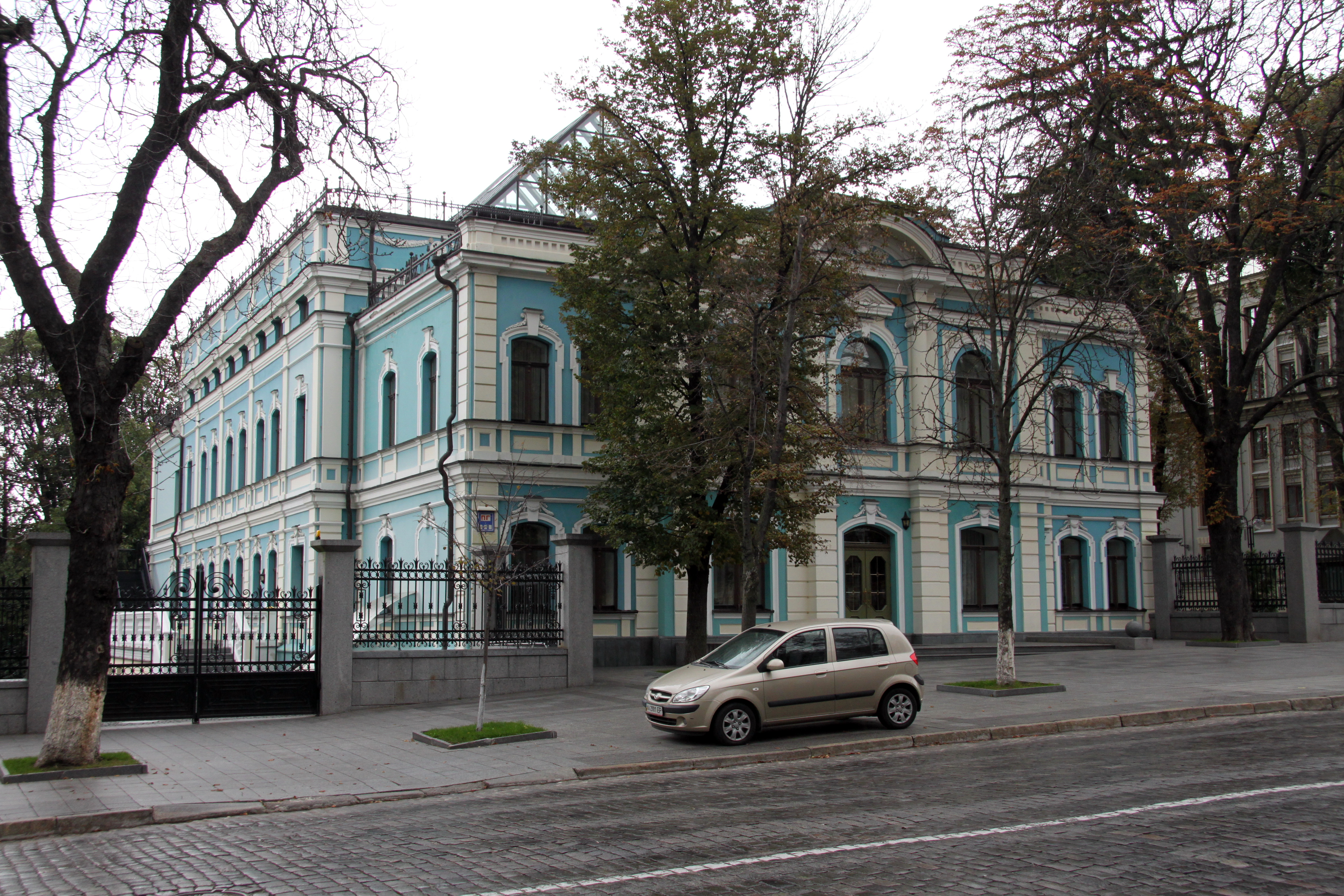 Будинок біржі, Київ, Інститутська вул., 7